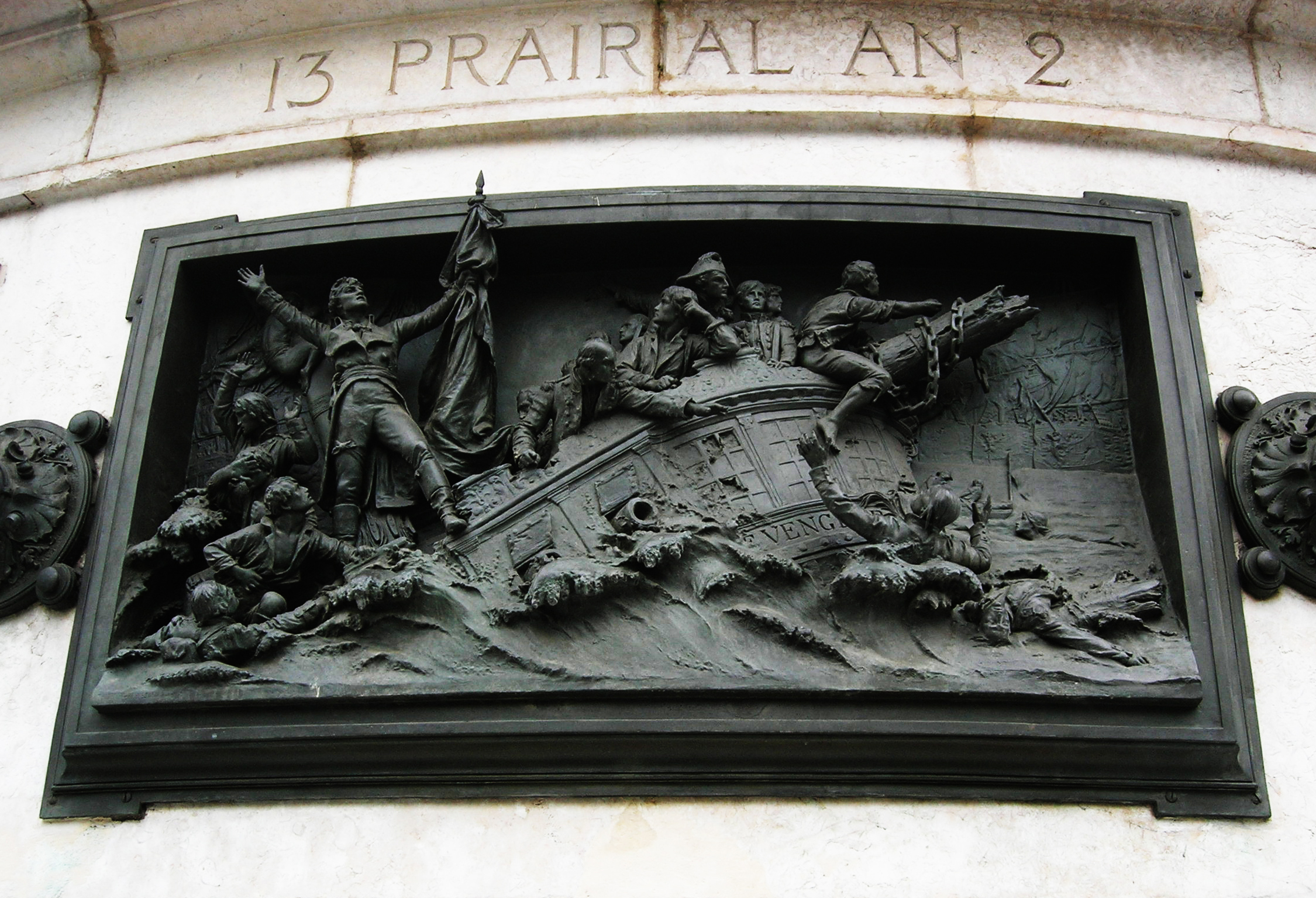 Marins de l'An II sur le socle du Monument à la République des frères Morice, Place de la République à Paris.